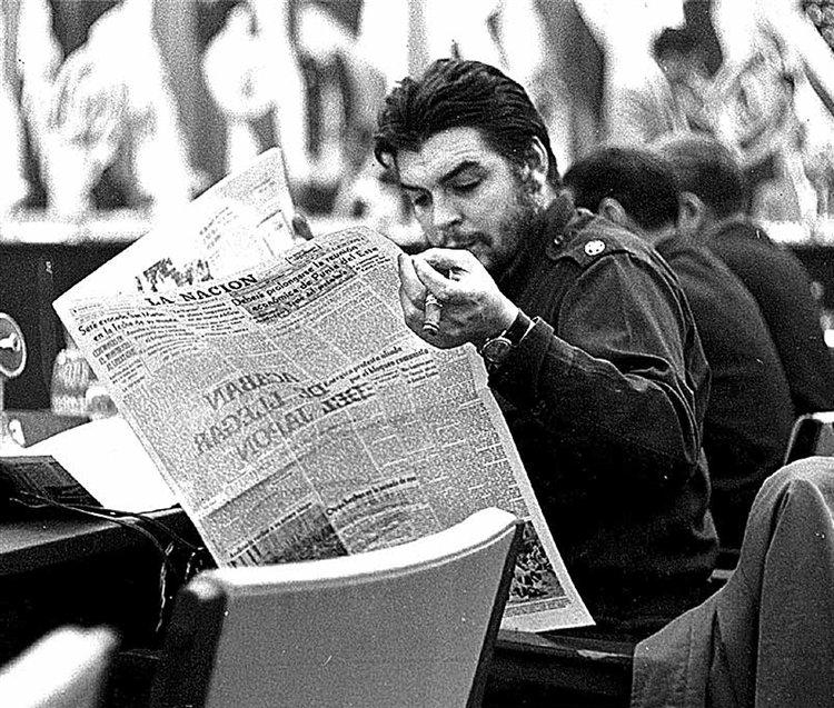 El Che Guevara leyendo el diario La Nación en Punta del Este, Uruguay.